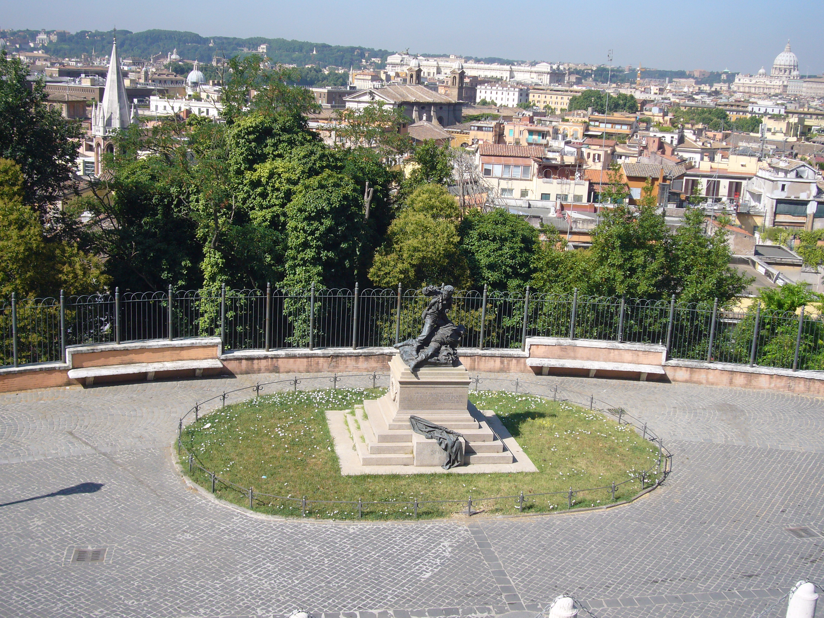 Roma, Pincio: monumento ai fratelli Enrico e Giovanni Cairoli (Ercole Rosa, 1883)